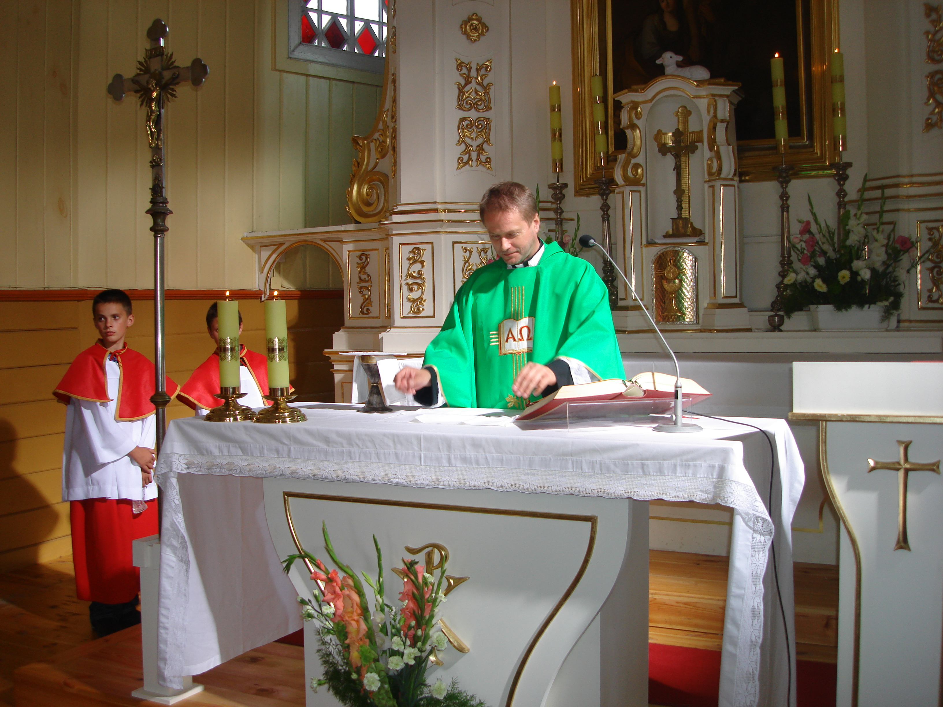 Ojciec Mateusz przy ołtarzu